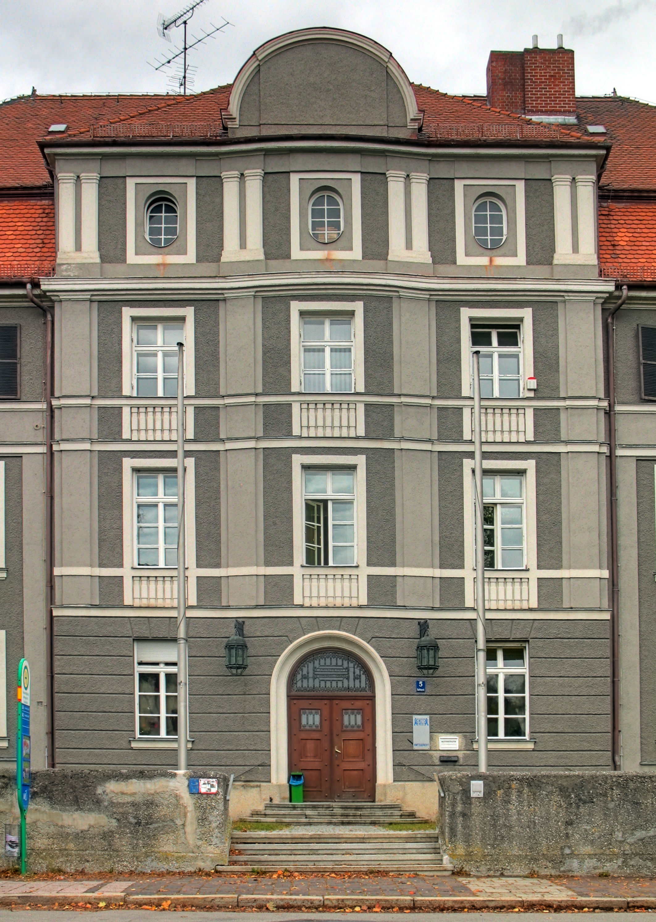 Deutschland, Bayern, Fürstenfeldbruck, Amtsgericht in der Stadelbergerstraße, Tonemapped HDR-Aufnahme